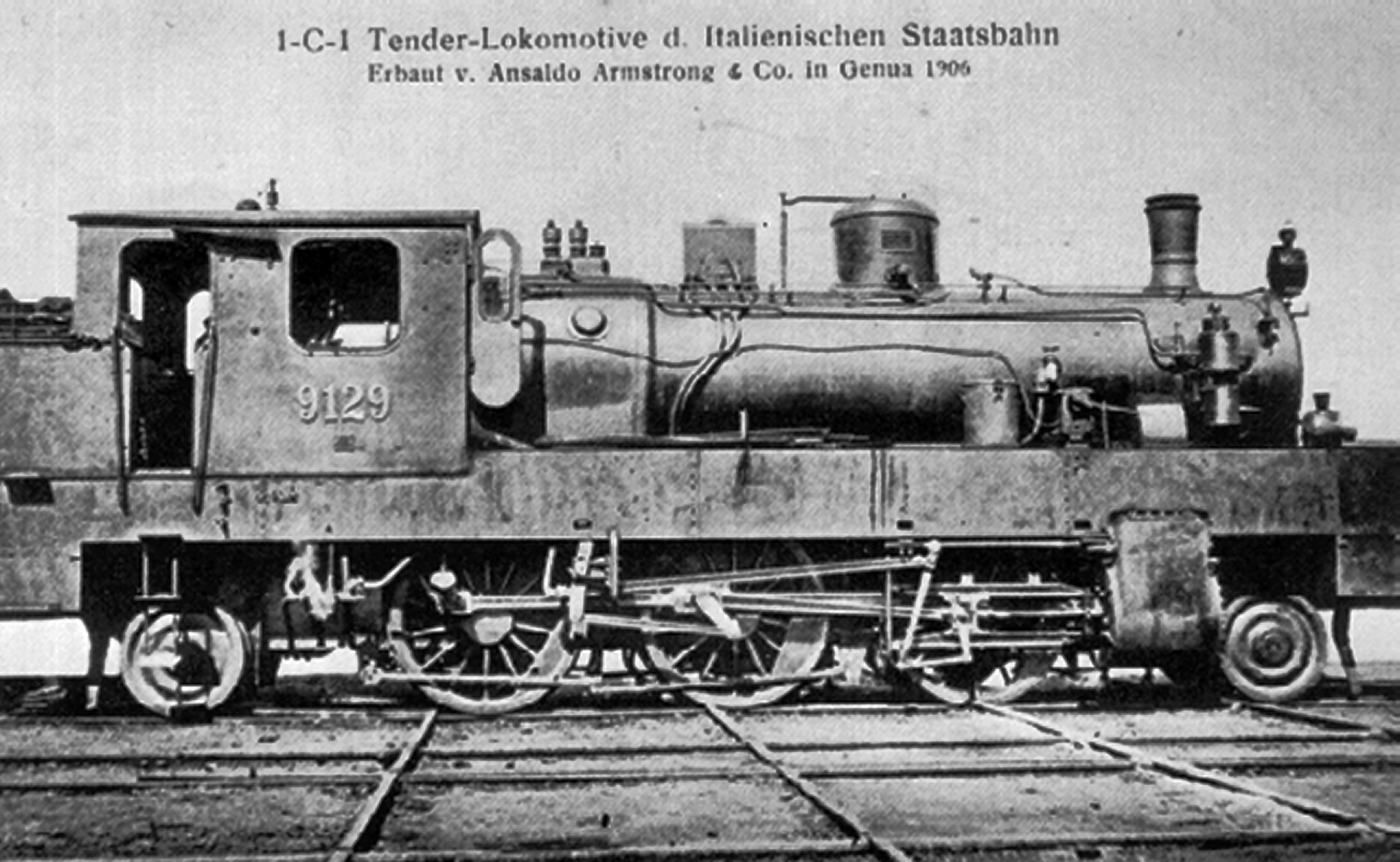 Locomotiva FS 910